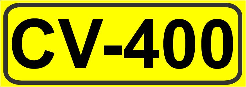 Inidcador de la Carretera de la Comunidad Valenciana CV-400